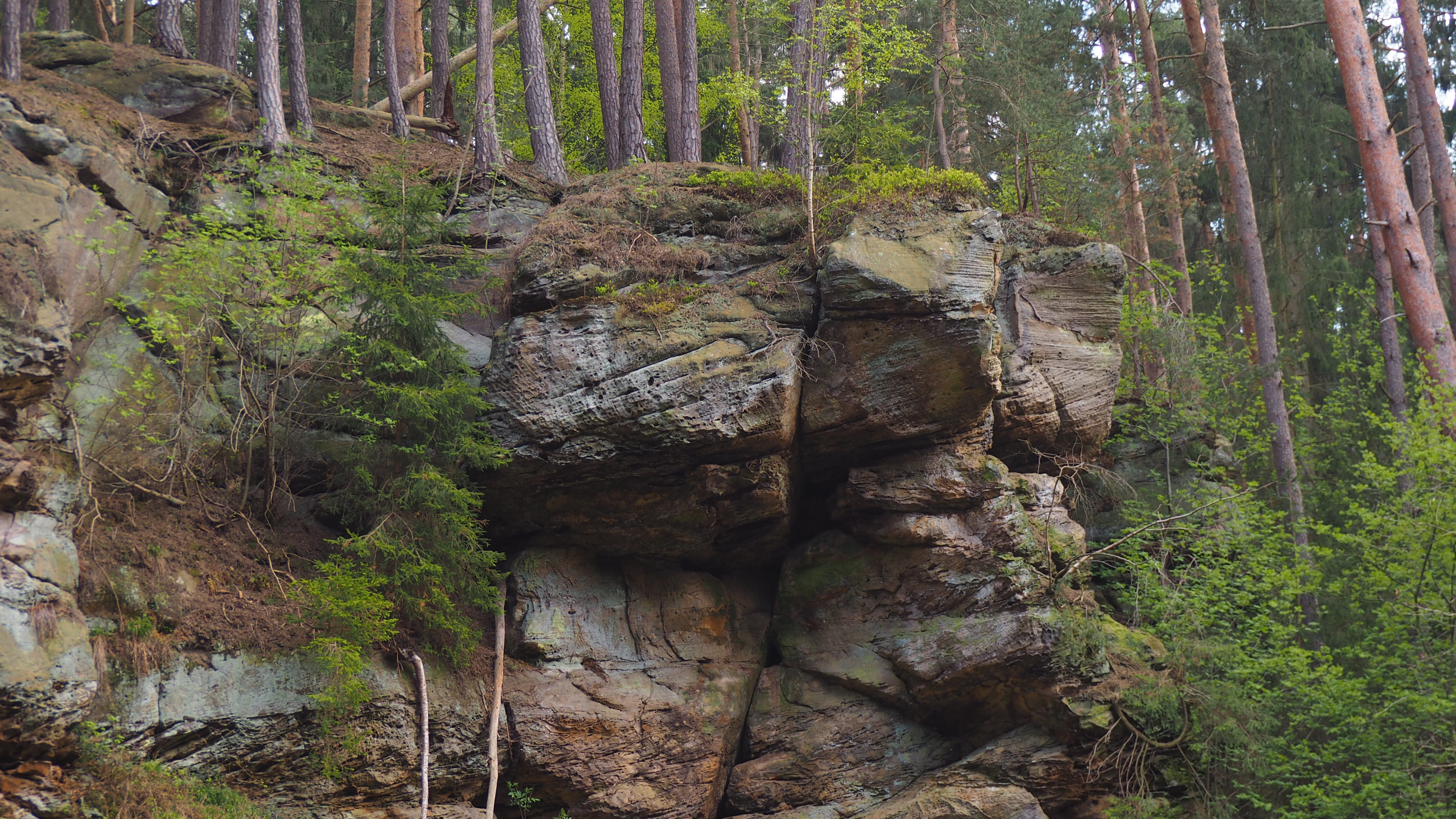 Nördlicher Blick auf Katte-Kurts-Klippe (Naturdenkmal) nahe Volkmarsen.